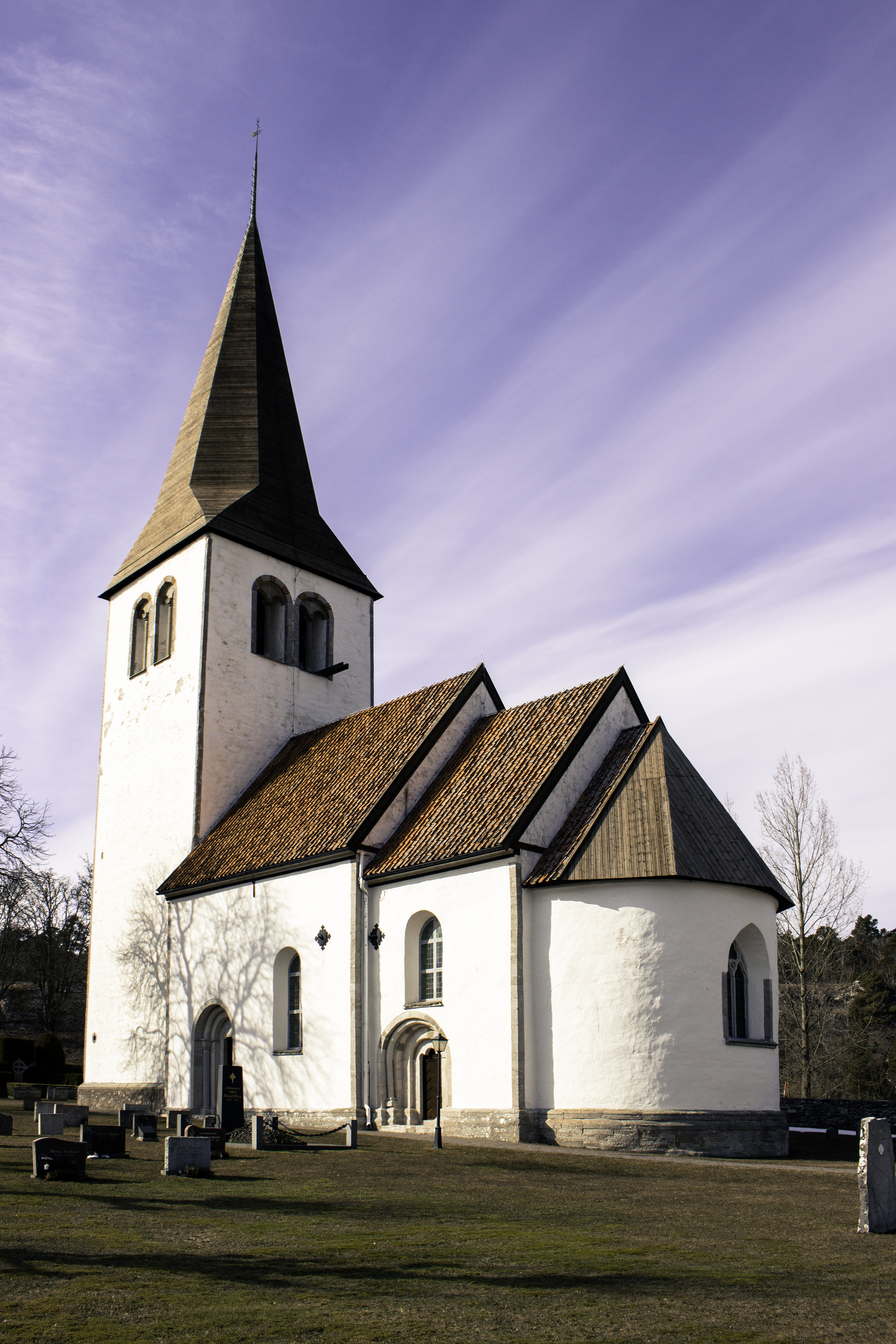 Igrexa de Linde, na illa sueca de Gotland.